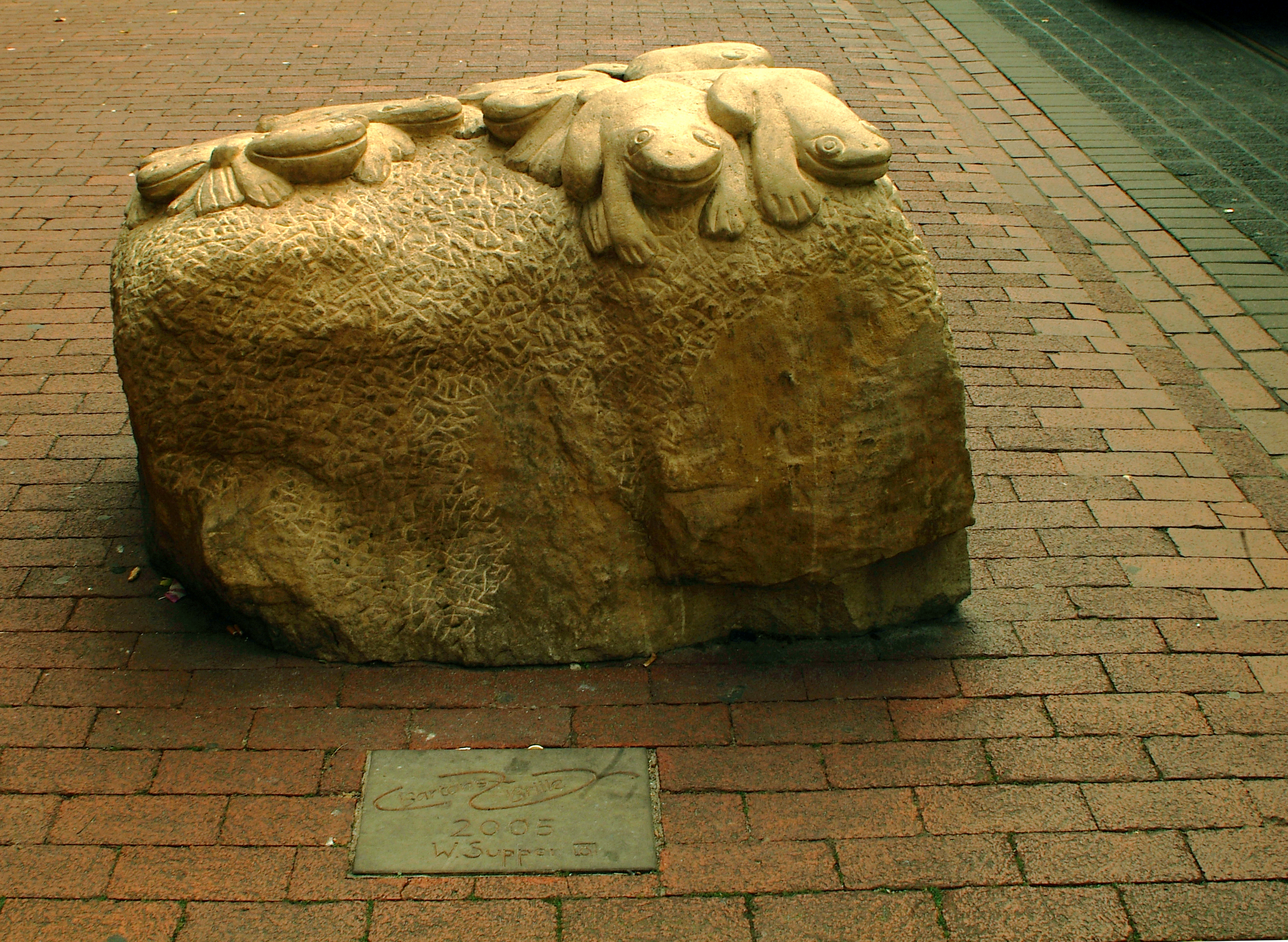 Wolfgang Supper's Skulptur mit den dreizehn Fröschen von Wolfgang Supper mit der Bodenplatte von 2005 vor dem Optikergeschäft Bartons Brille in der Limmerstraße